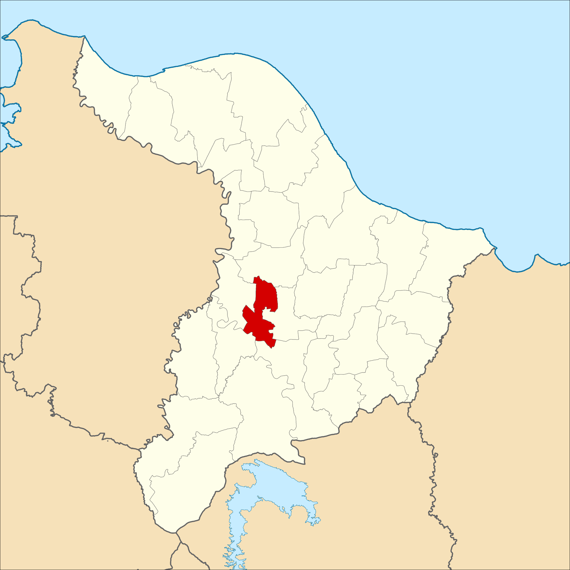 Peta Lokasi Kecamatan Karawang Timur, Kabupaten Karawang, Indonesia